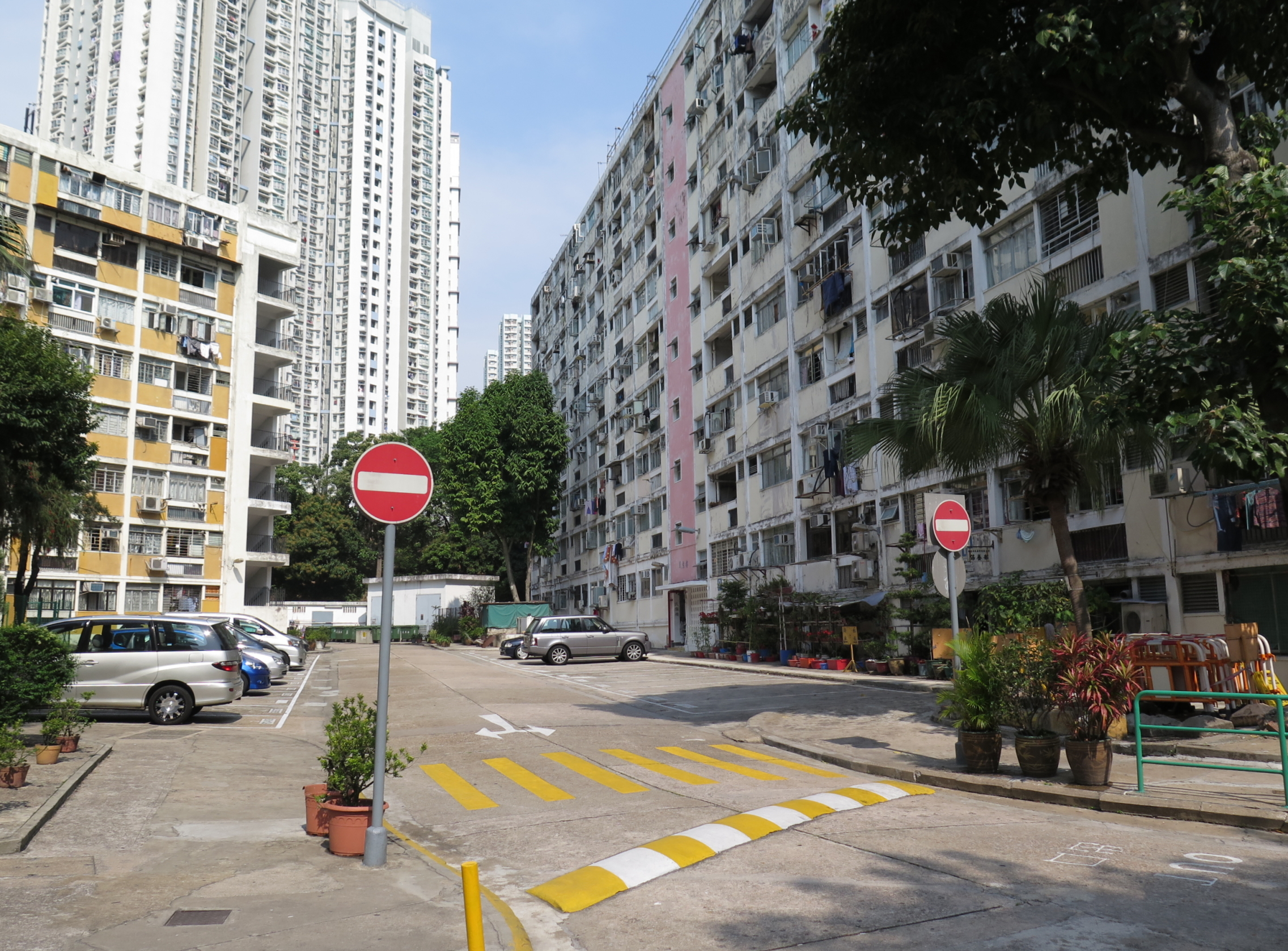 Tai Hang Sai Estate